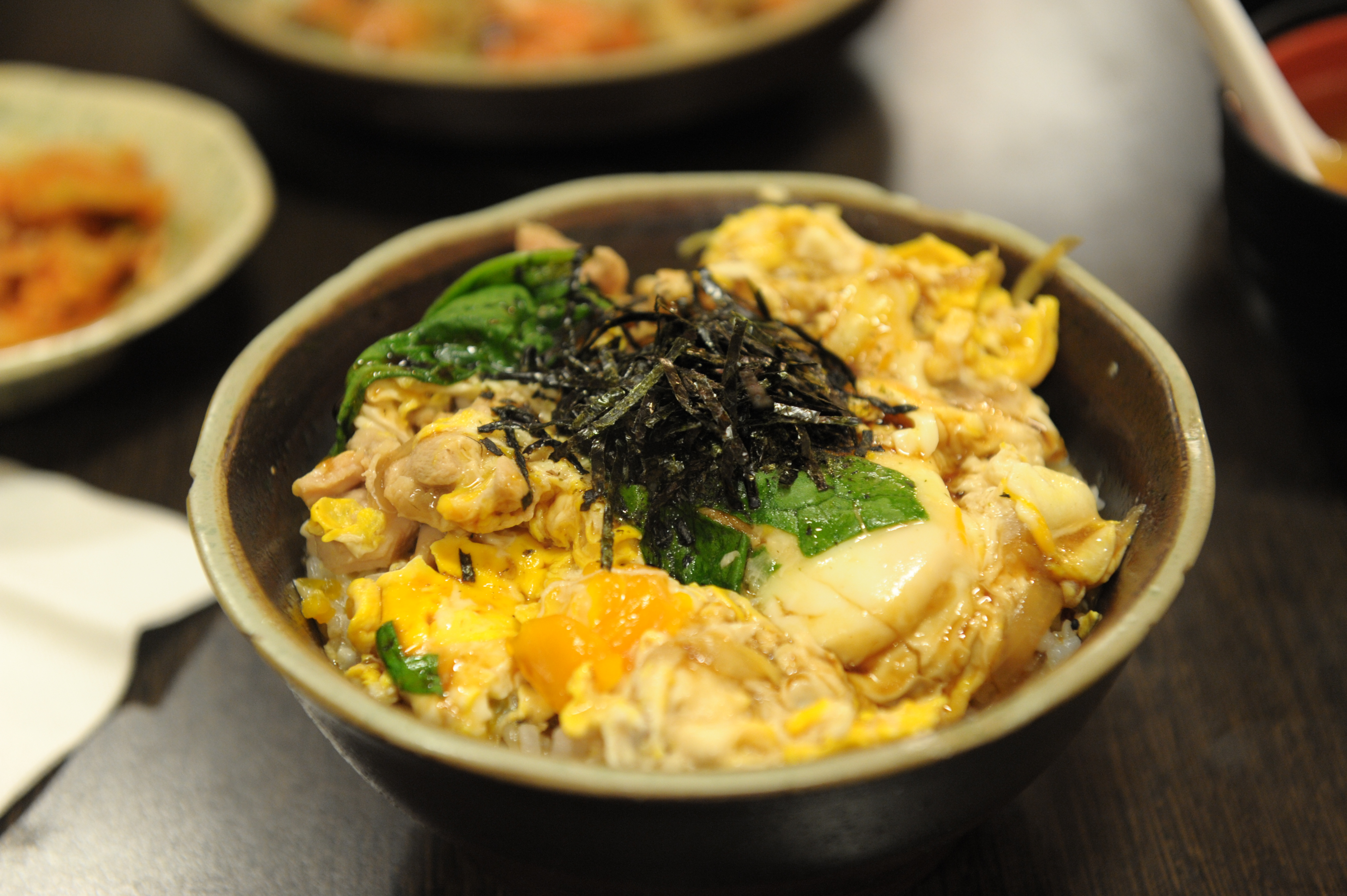 親子丼（台北市中正区汀州路二段217号、日本料理店「三大日味屋」）